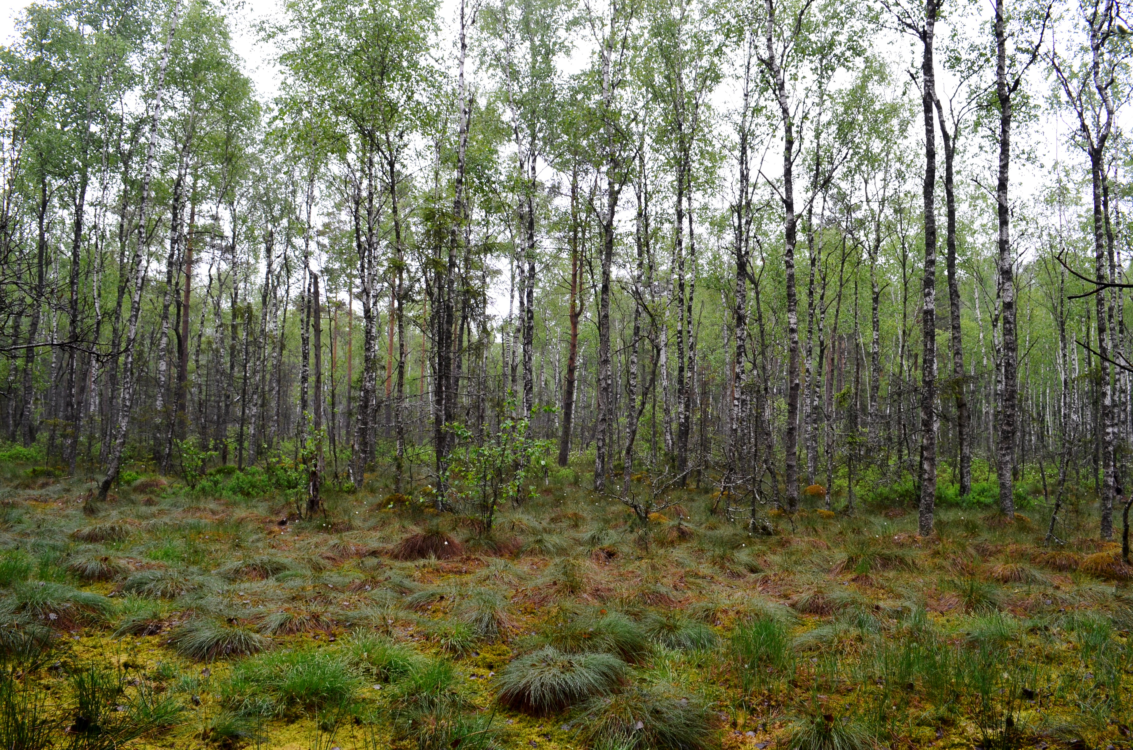 Aukštapelkė Papušynio miške, Kelmės r.